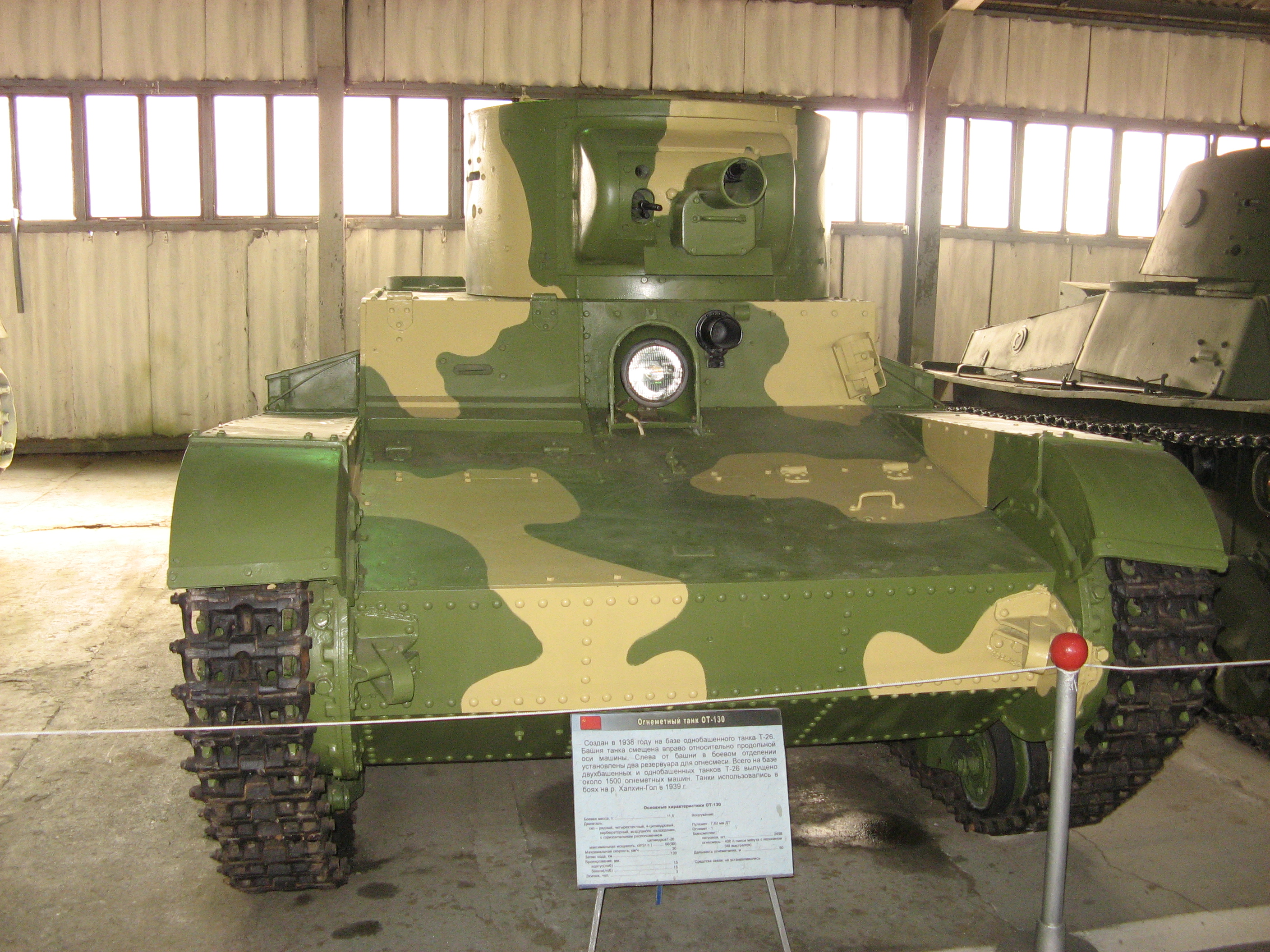 Tank museum kubinka Russia